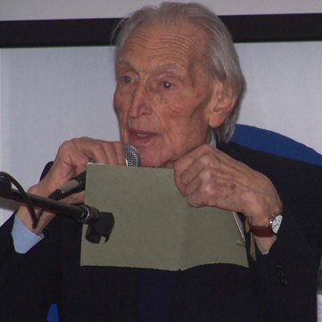 DANTE ISELLA, Critico letterario e filologo italiano